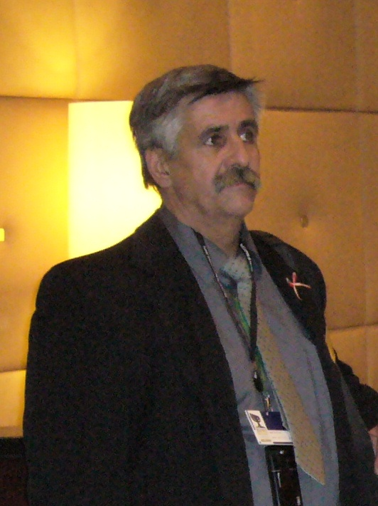 Henryk Bajewicz